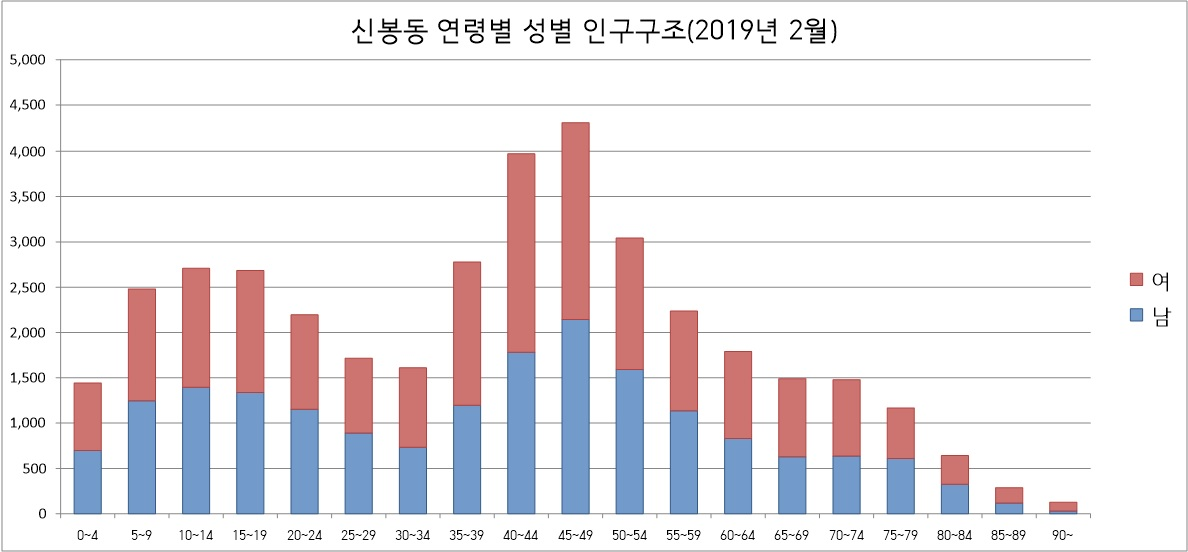 용인시 신봉동 성별 연령별 인구구조